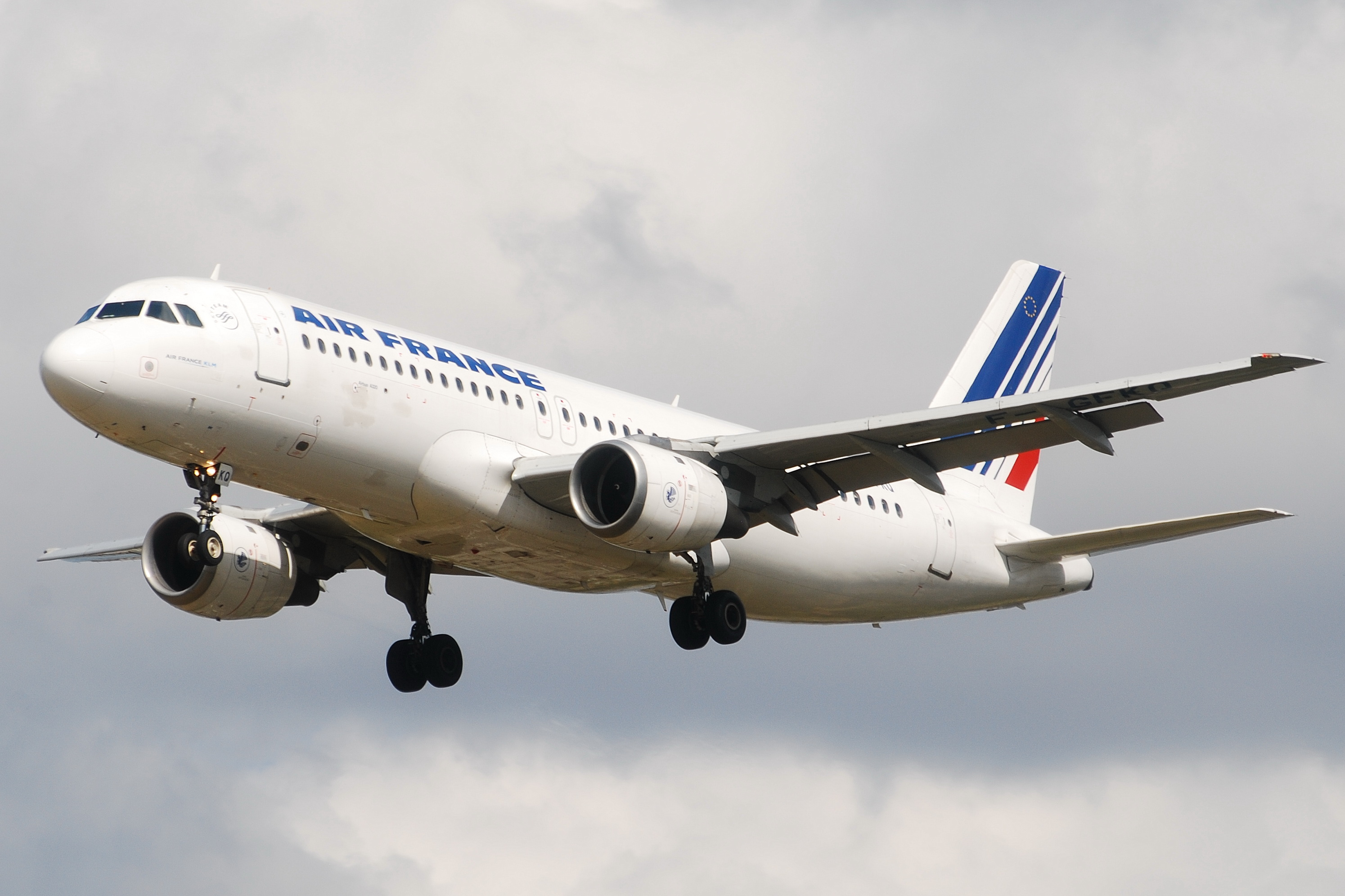 Photo prise à l'aéroport de Toulouse-Blagnac (LFBO) en France. Picture take at Toulouse-Blagnac Airport (LFBO) in France.